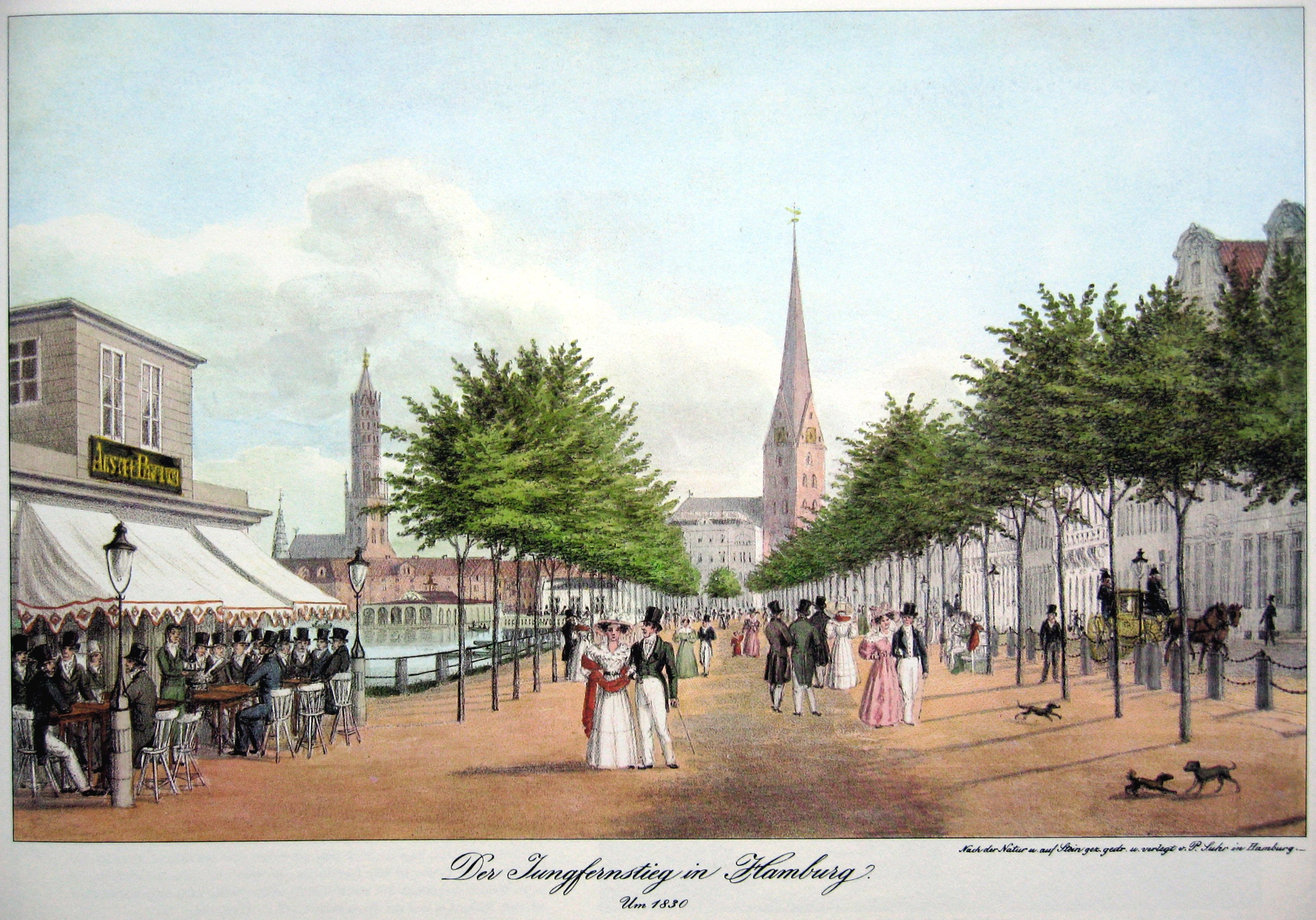 Hamburg Jungfernsteig